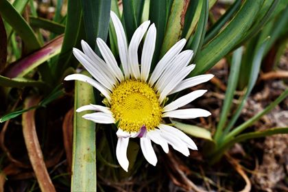 Imagen tomada durante la caminata fotográfica WIKI LOVES ANDES el 1ro de Noviembre de 2018 en la Quebrada Rajulcota, Parque Nacional Huascarán, Áncash, Perú.